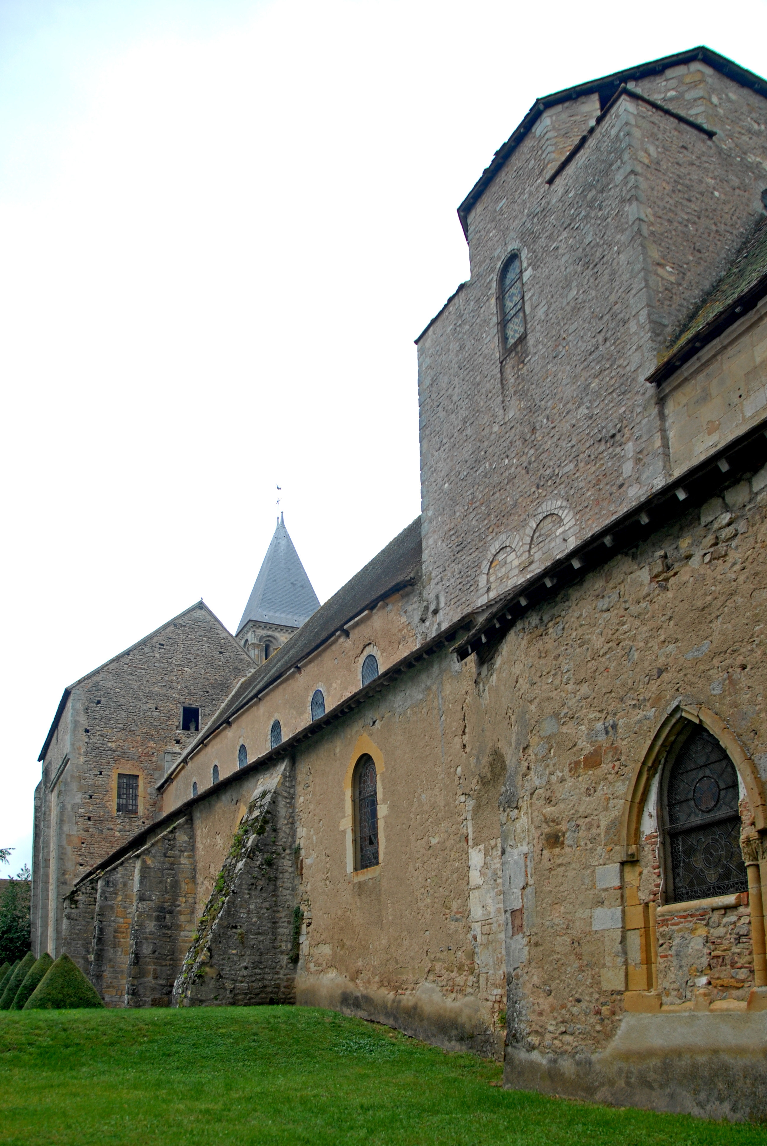 Prioratskirche, Südostseite von NO